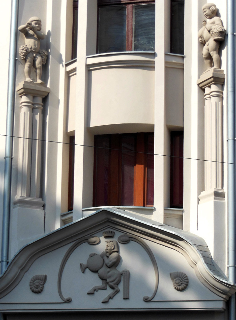 Dom Towarowy Jedynak, ul. Gdańska 15 w Bydgoszczy (zbud. 1910)